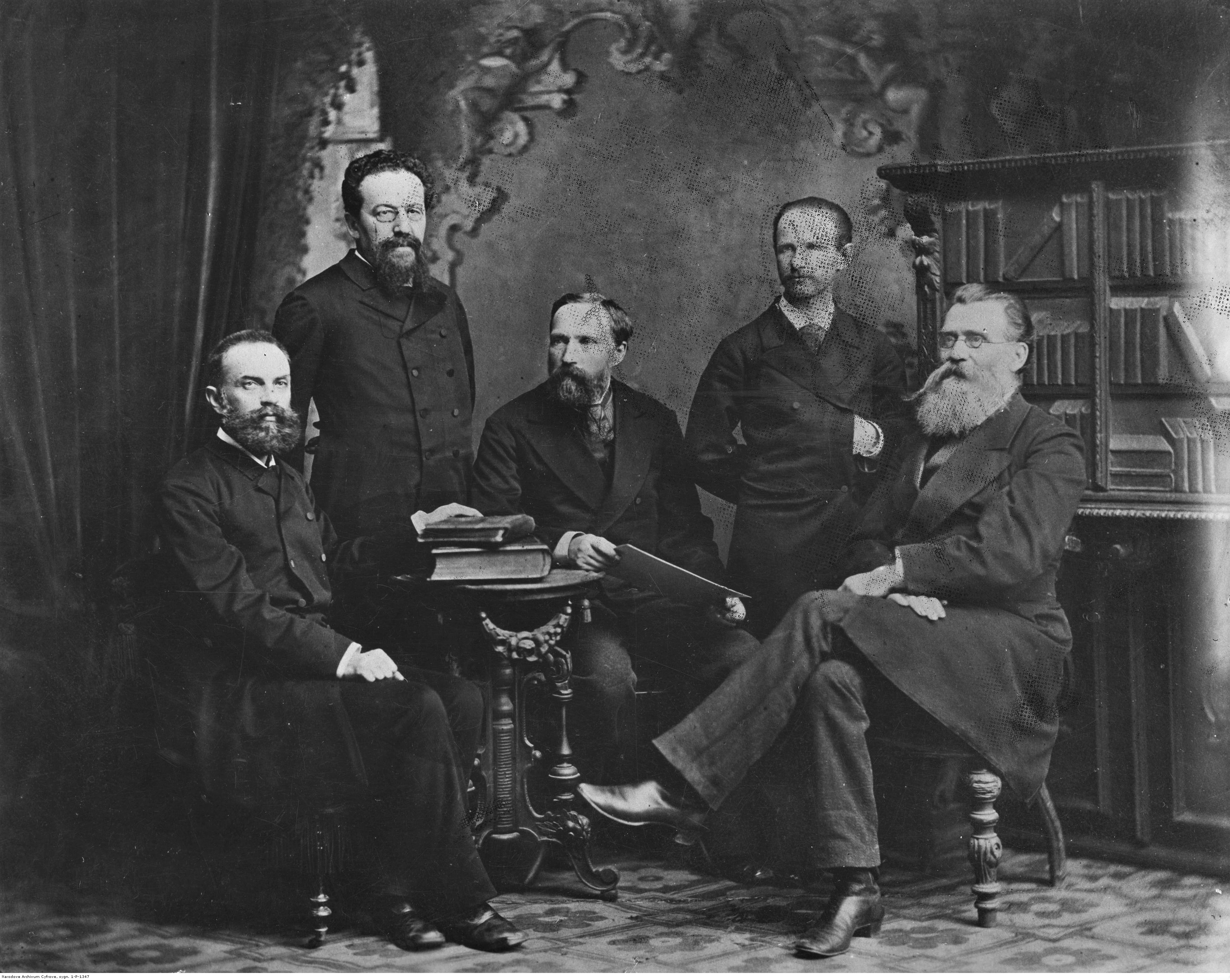 ссыльные поляки-повстанцы в Иркутске (слева направо): Мариан Дубецкий, Генрих Воль, Бенедикт Дыбовский, Феликс Зенкович и Леон Домбровский